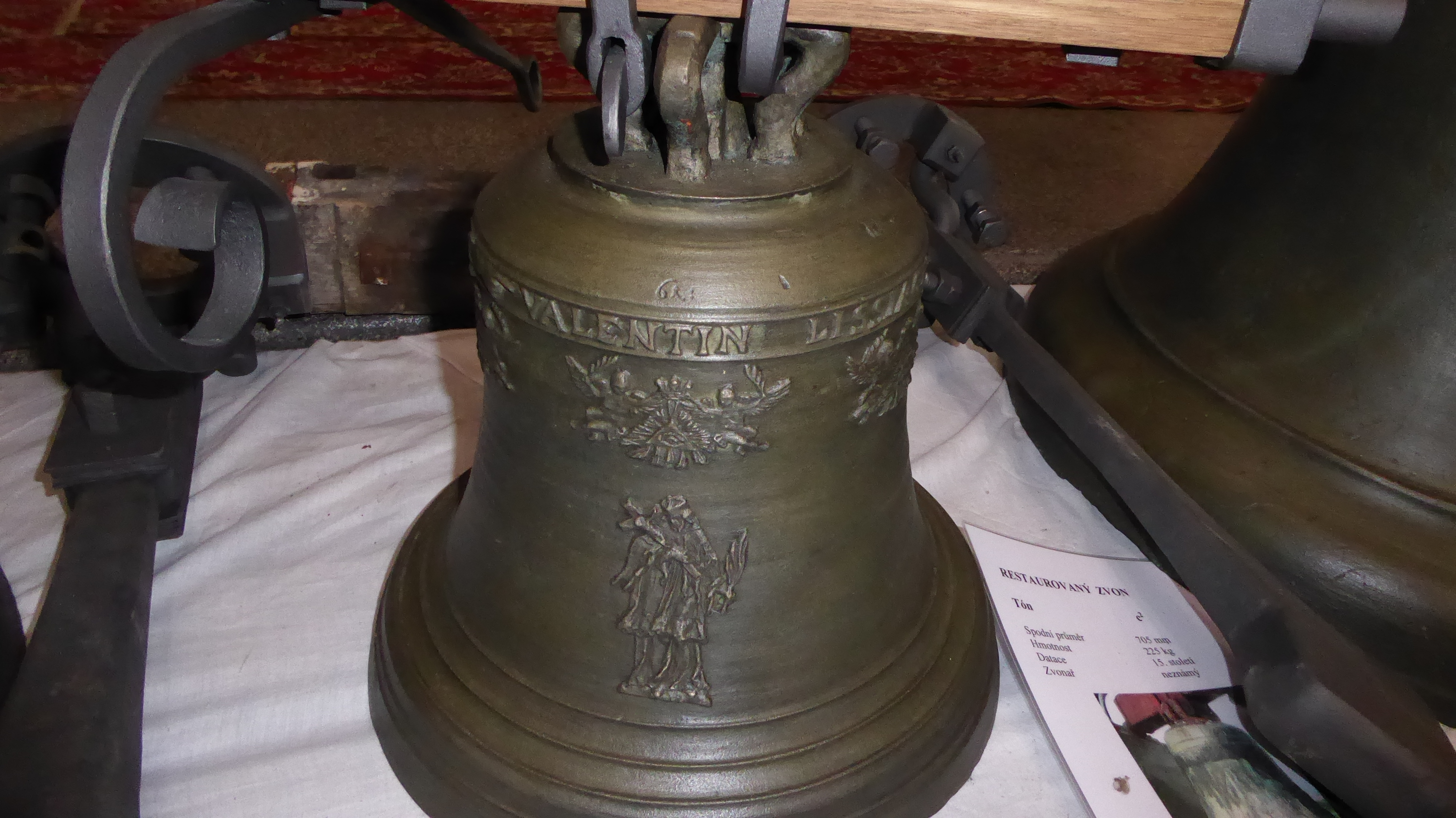 Valentin Lissiack